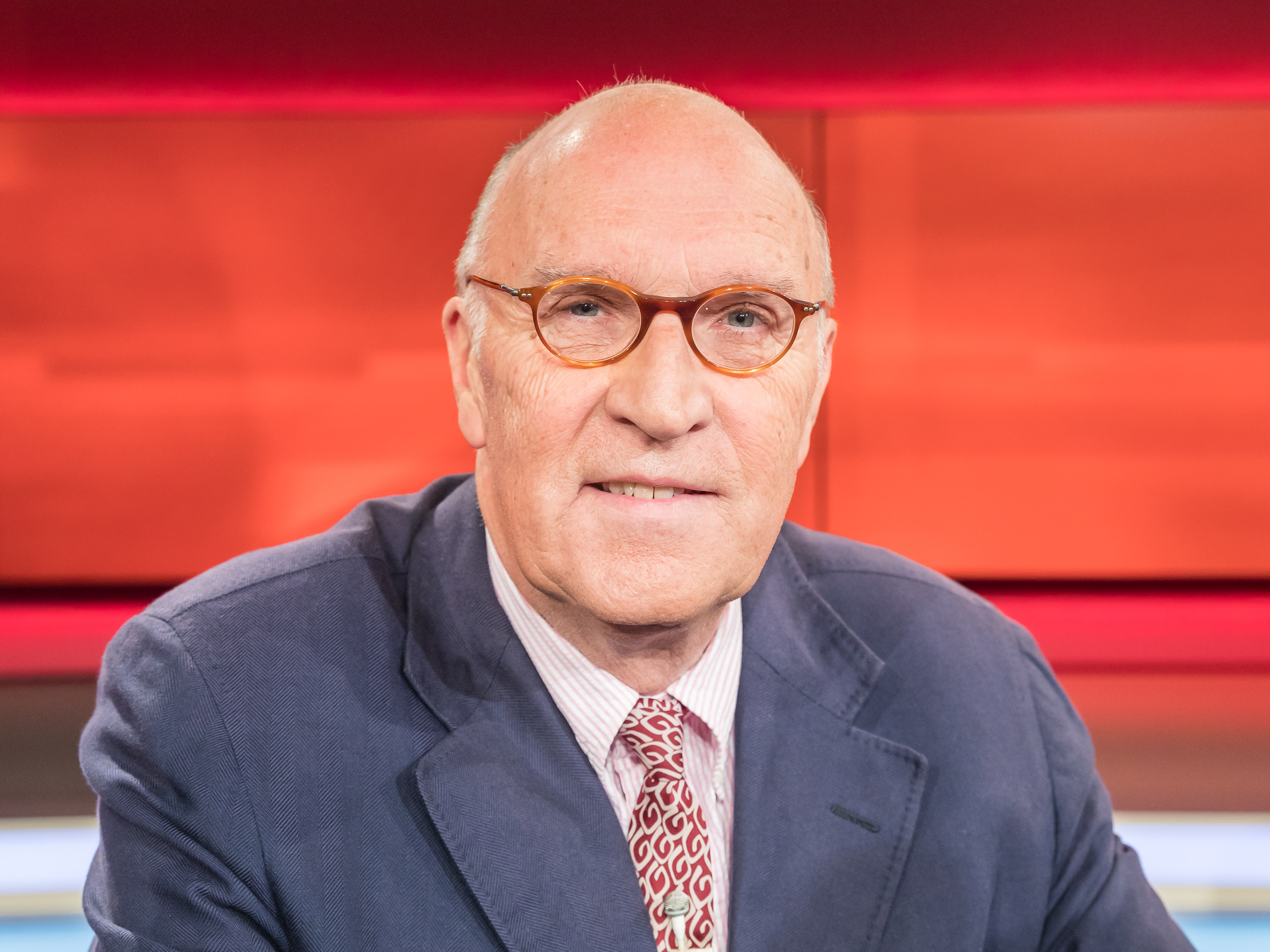 Pressetermin nach der Sendung „Hart aber Fair“ am 30. September 2019. Thema der Sendung: „Trump und Johnson unter Druck – Endspiel der Populisten?" Foto: Christian Hacke, Politikwissenschaftler